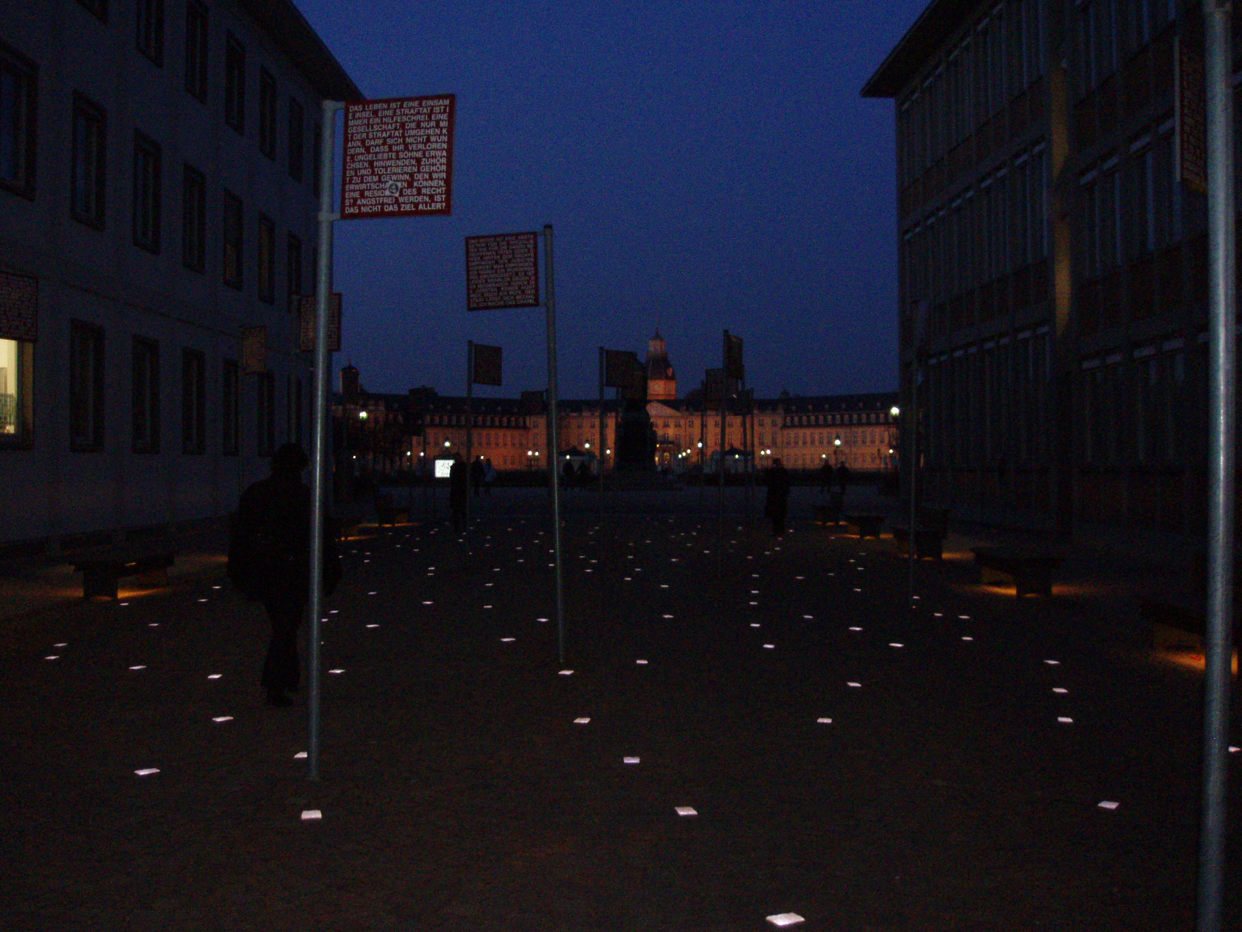 Installation vor dem Karlsruher Schloss von Jochen Gerz: Platz der Grundrechte